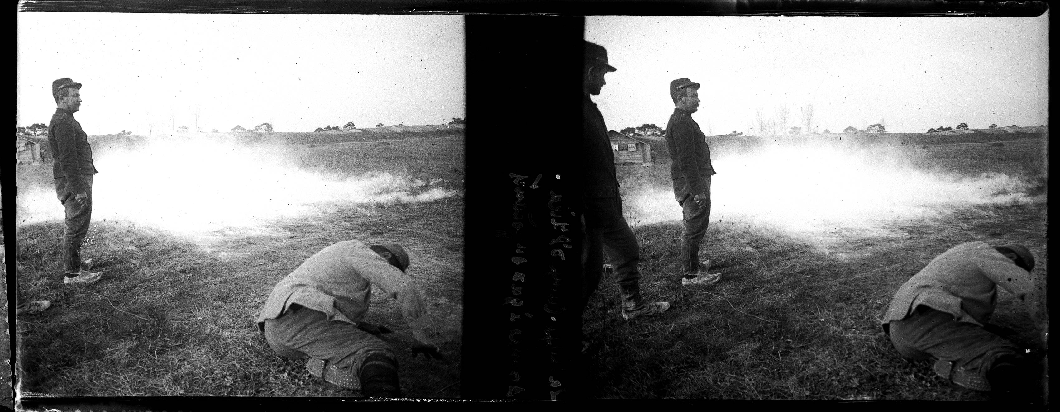 Essais de bombes à gaz suffocants au camp d'Attila près de La Cheppe dans la Marne. 1916. Guerre 1914-1918.